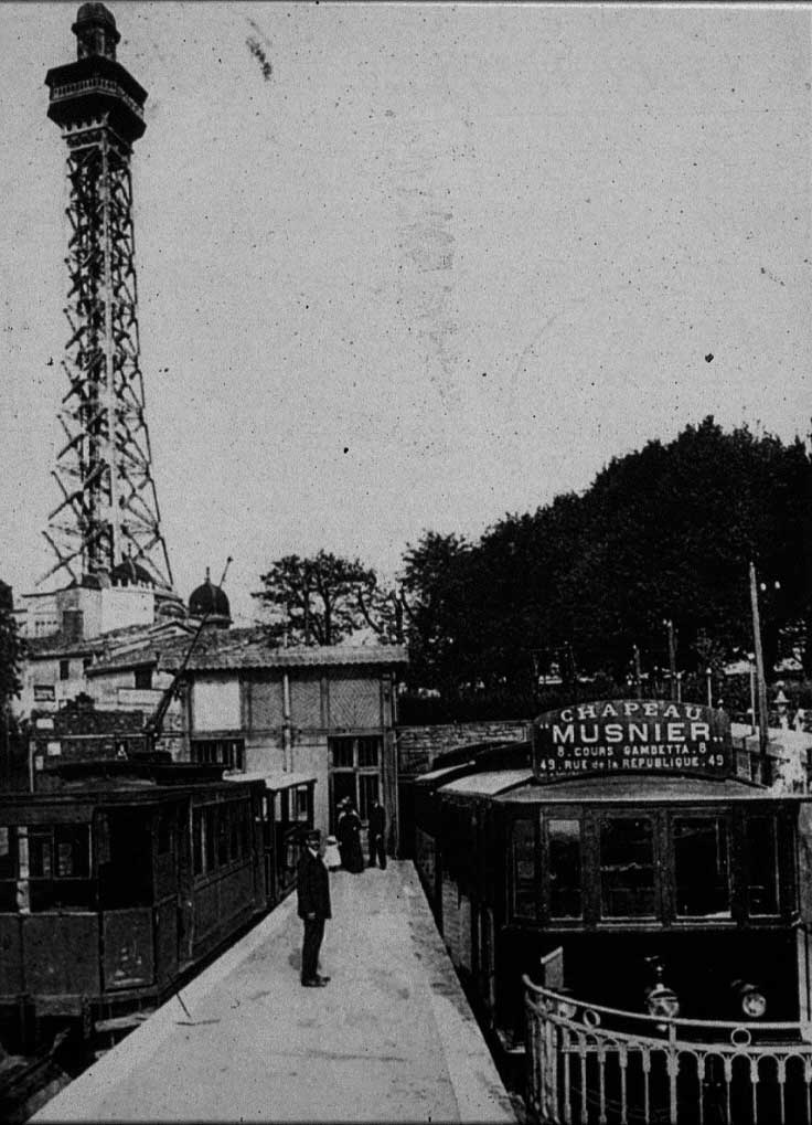 Le Funiculaire Saint-Paul - Fourvière et le tramway funéraire Fourvière - Loyasse